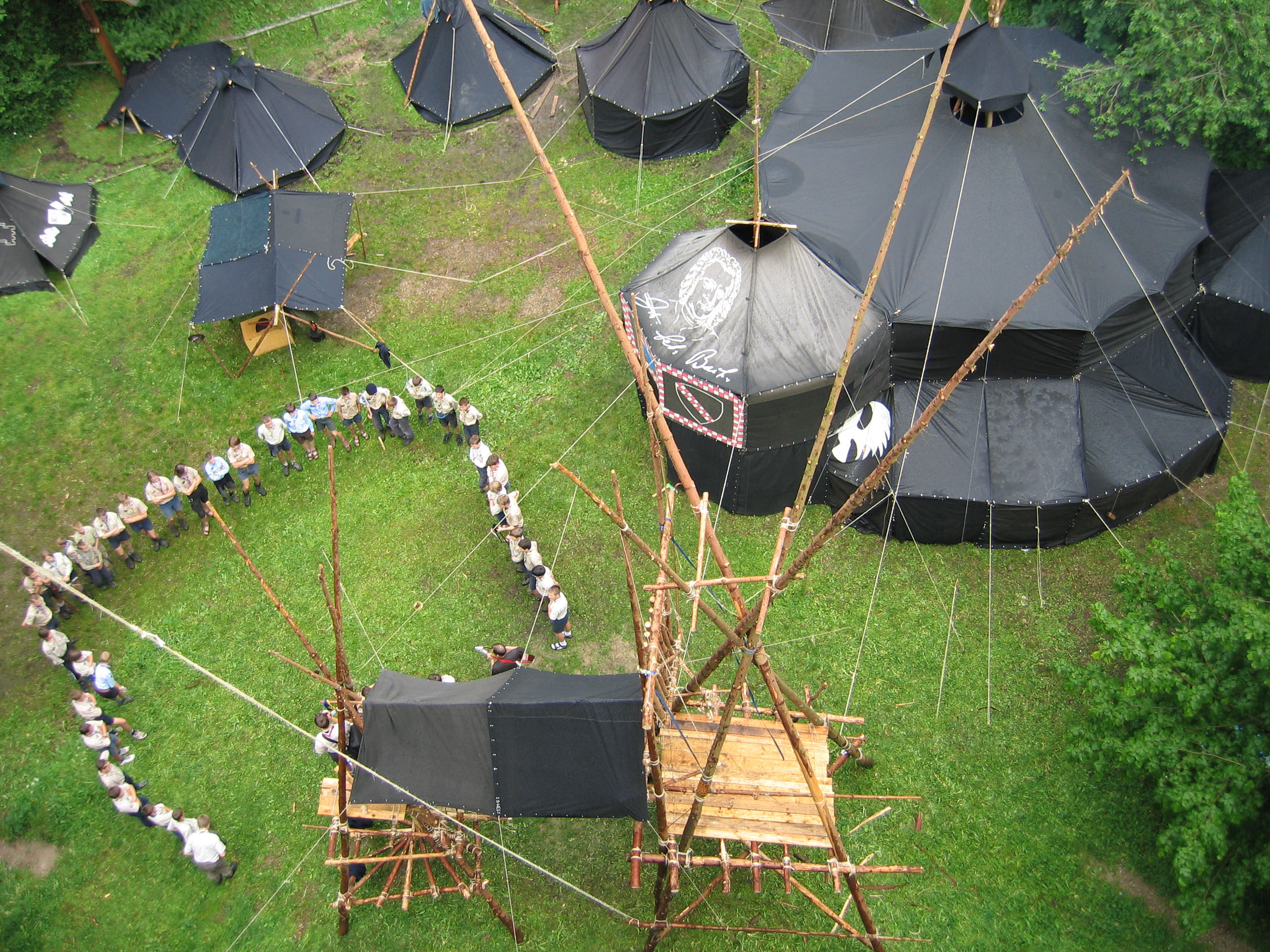 KPE-Pfadfinderlager bei der Alt-Trauchburg